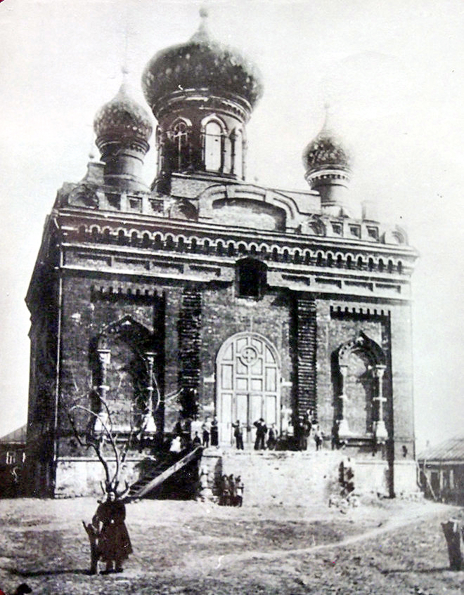 Единоверческий храм Иоанна Златоуста в Туле (Church of Ioann Zlatoust in Tula)